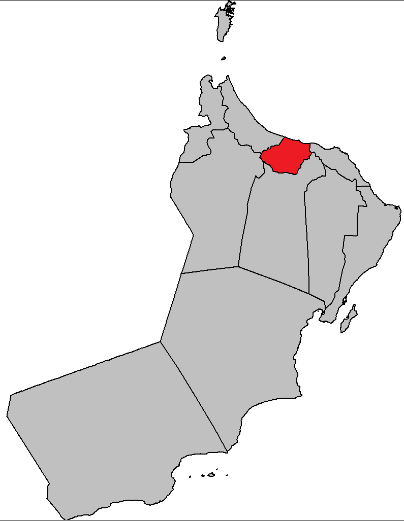 オマーン（Oman）・南バーティナ地方（Al Batinah South Governorate）の地図（Map）。